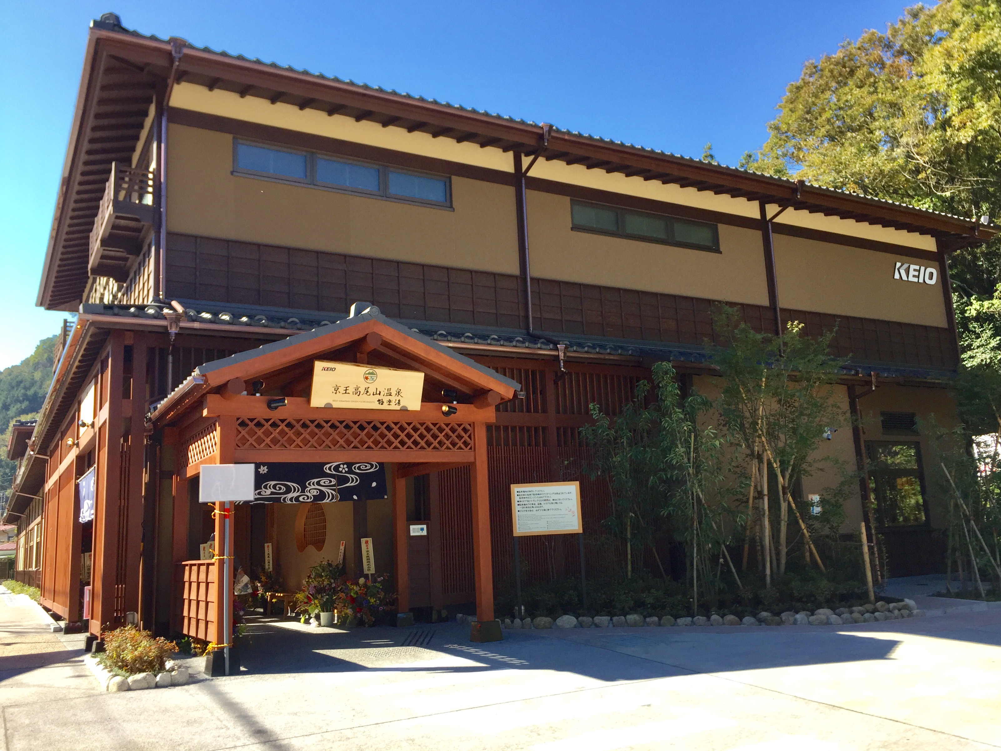 高尾山の玄関口、京王高尾線高尾山口駅の西側に隣接する日帰り温泉施設「京王高尾山温泉 / 極楽湯」。